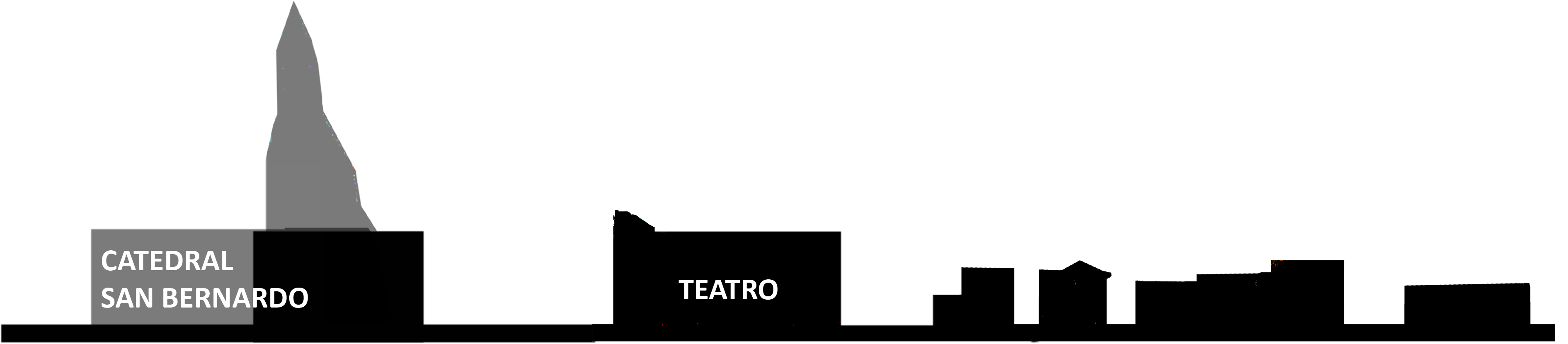 Ex teatro municipal de San Bernardo elevacion